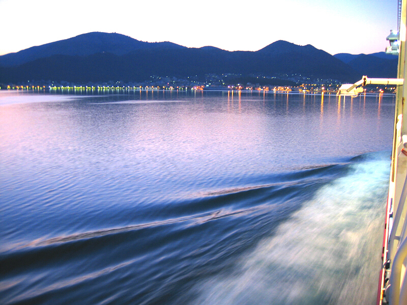 Bildbeschreibung: Blick auf Igoumenitsa aus einlaufender Fähre Quelle: selbst geschossen im Sommer 2005 Fotograf/Zeichner: Mingas Datum: August 2005 Sonstiges: Uhrzeit ca 5:30 am Morgen Ortszeit